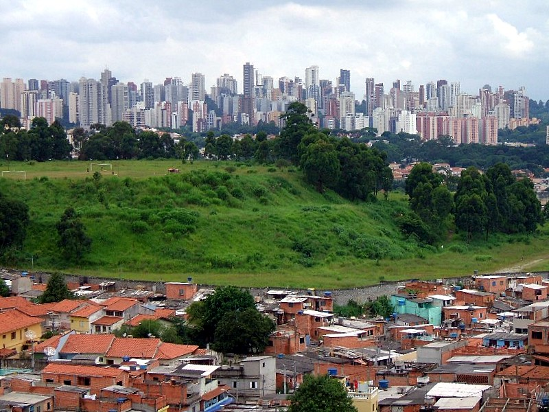 Favela Jaqueline, do distrito de Vila Sônia (São Paulo, Brasil)